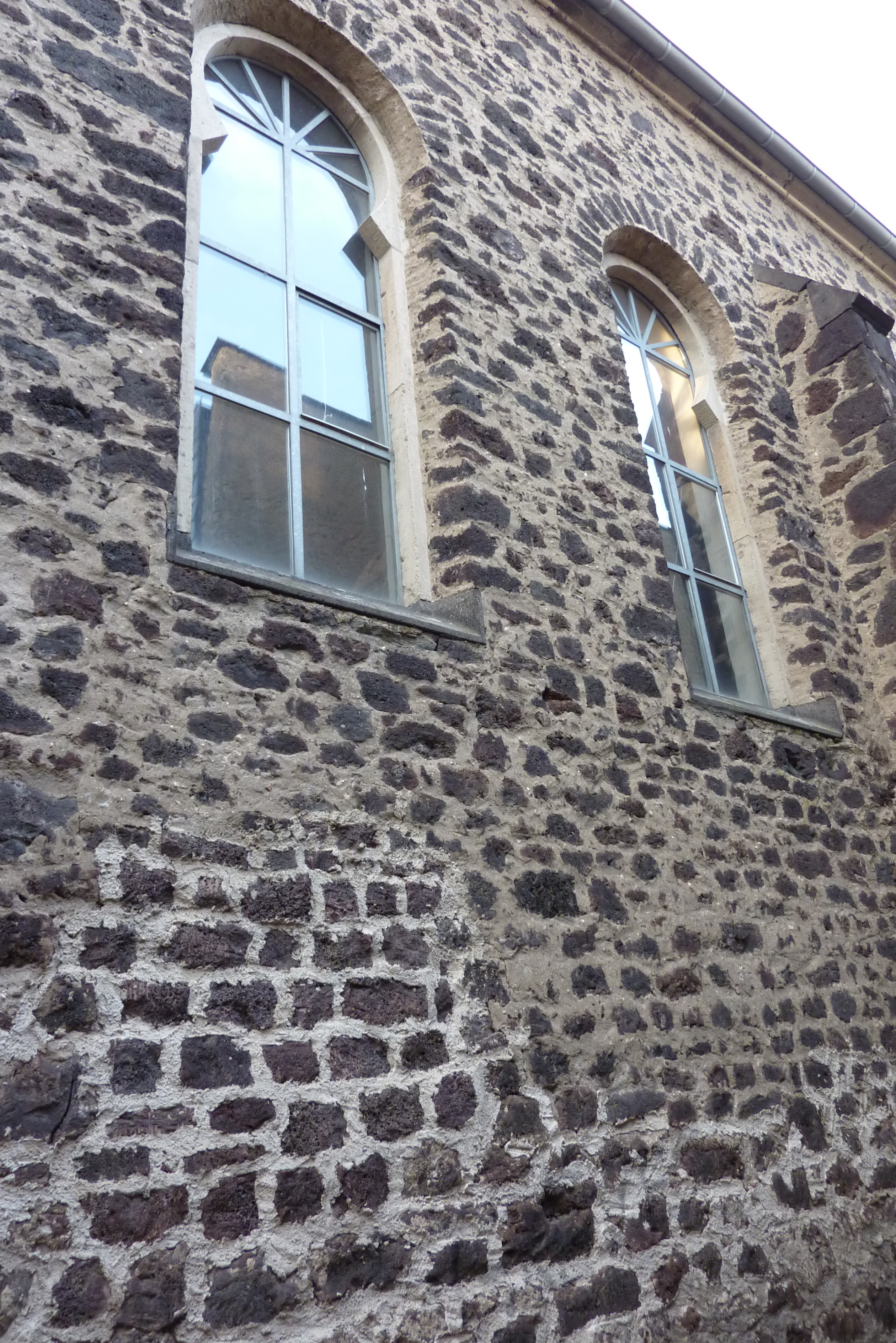 Synagoge (Polch)